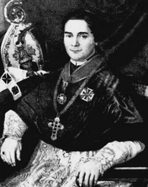 Alois Josef Schrenk - maloval J.V.Hellich